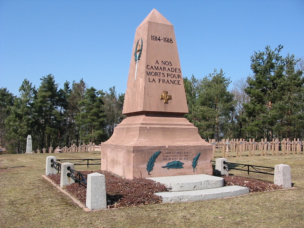 Cimetière militaire des Tiges Nécropole nationale des Tiges (Commune de Saint-Dié-des-Vosges) Photographie personnelle, prise le 19 mars 2006 Copyright © Christian Amet